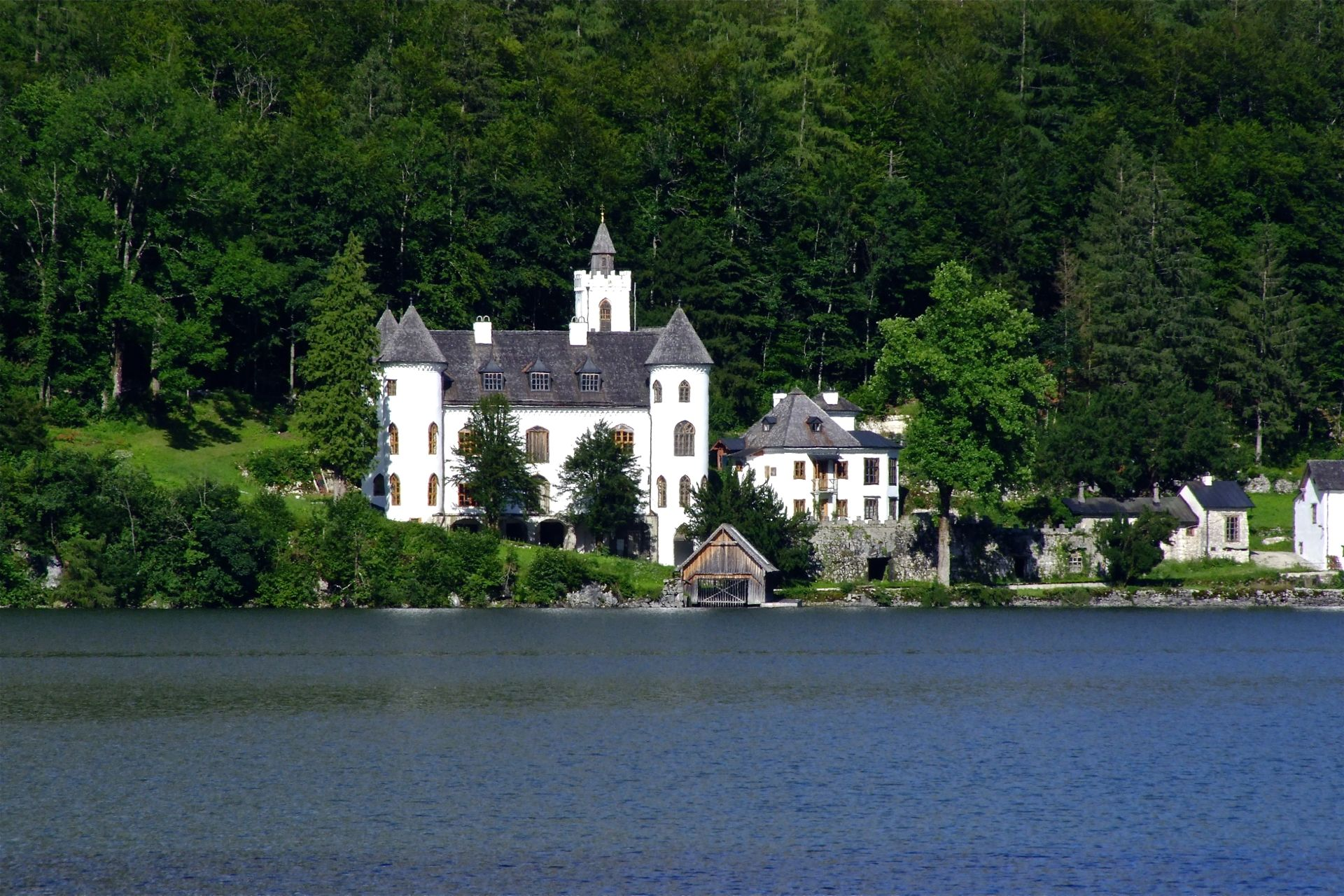 Schloss Grub samt Nebengebäuden